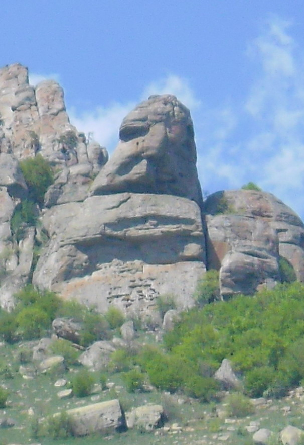 Хой-Кая: Фото